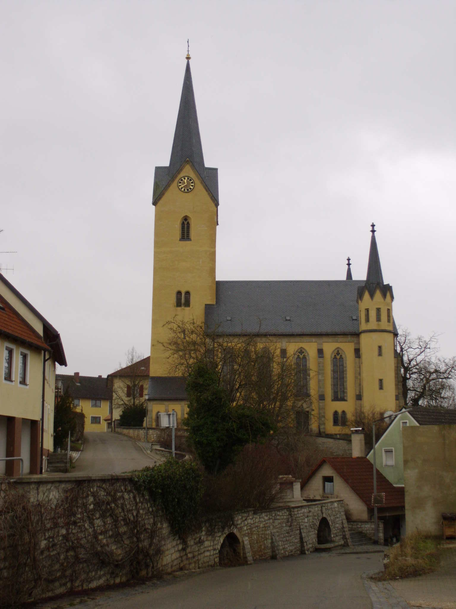 Evangelisch-lutherische Pfarrkirche in Hechlingen am (Hahnenkamm-)See, Ortsteil von Heidenheim im Landkreis Weißenburg-Gunzenhausen, Mittelfranken